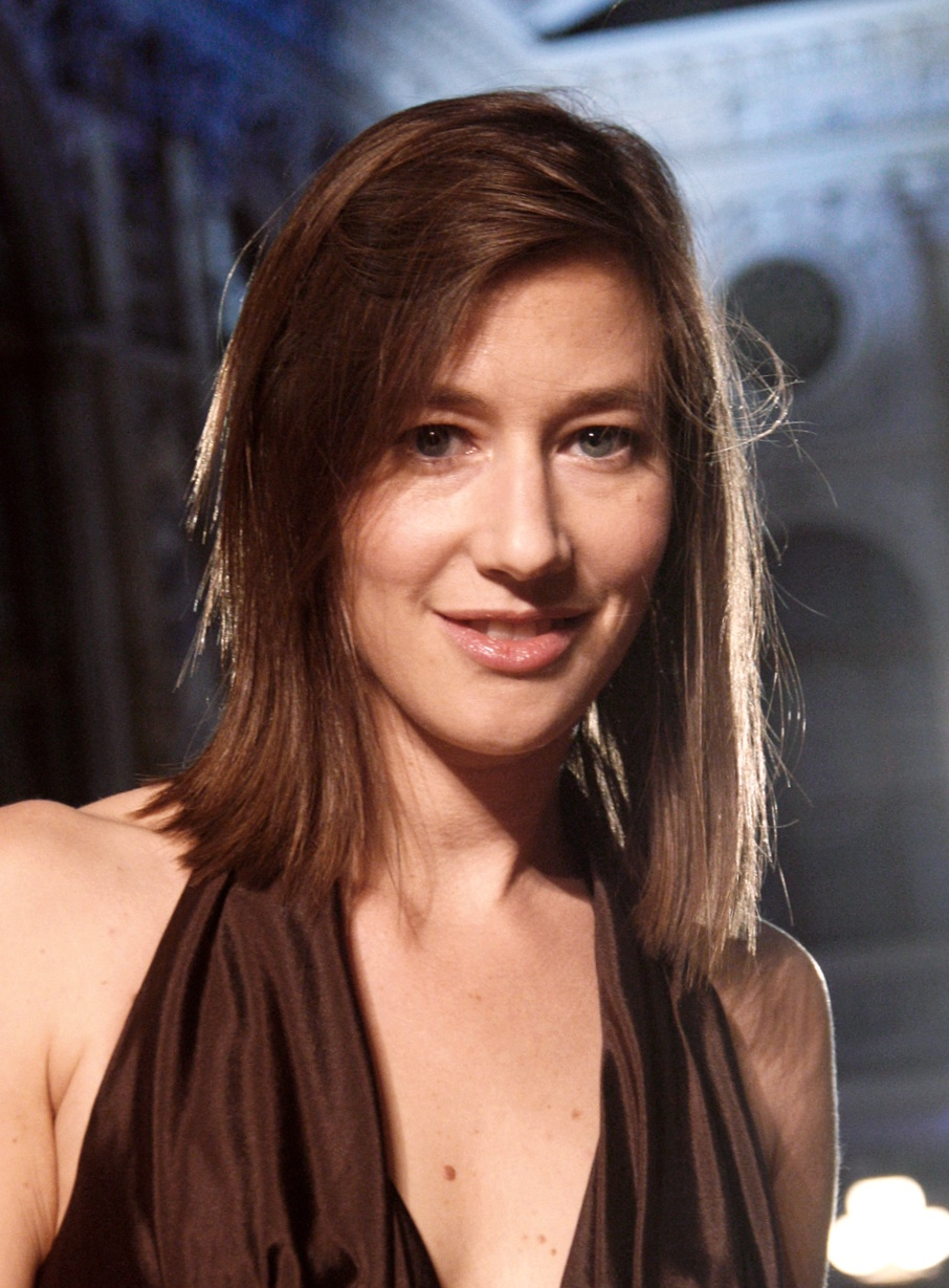 Johanna Wokalek zu Gast bei der Verleihung des Nestroy-Theaterpreises 2010 im Burgtheater in Wien.